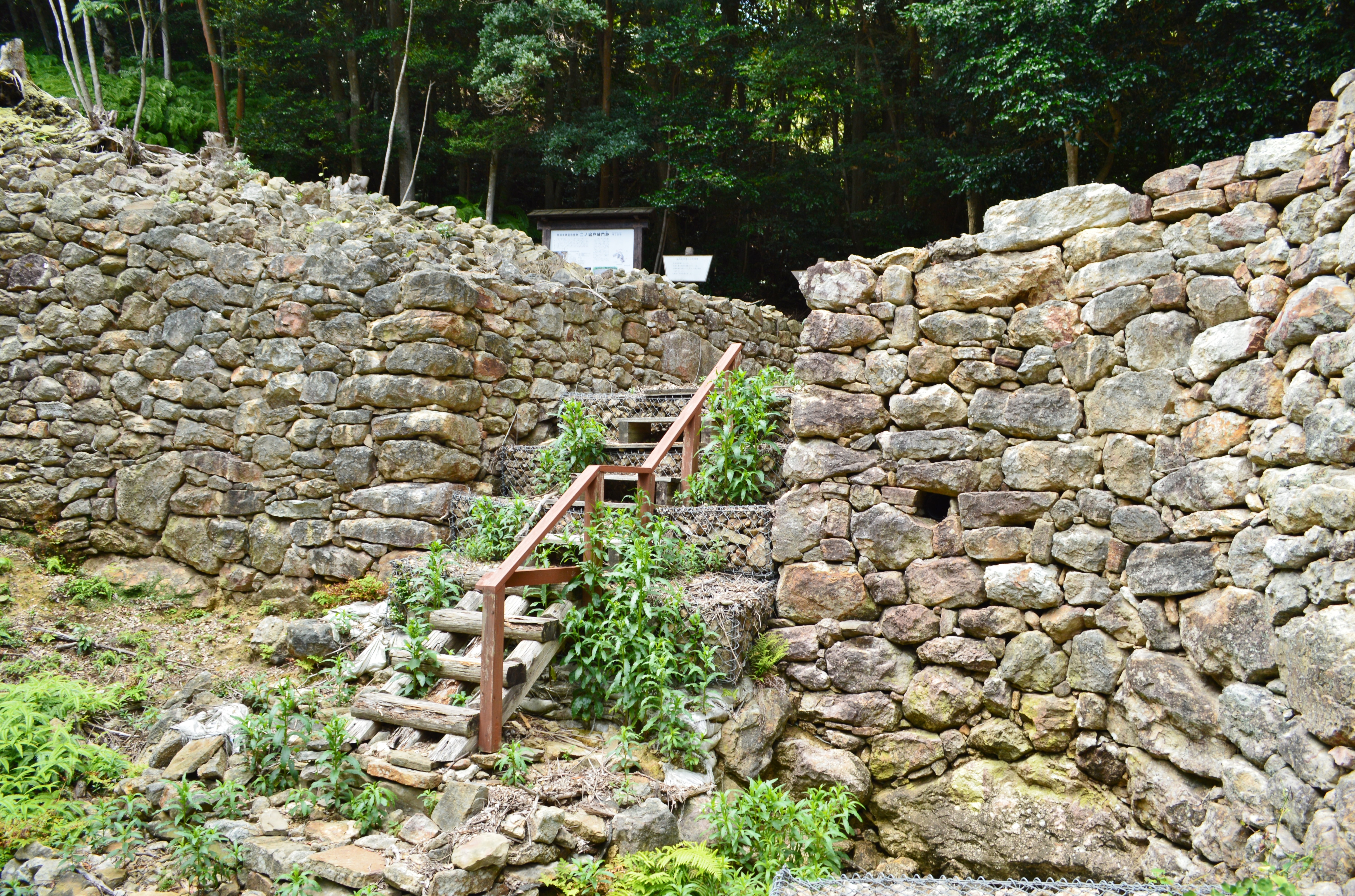 金田城 二ノ城戸 (城外側)